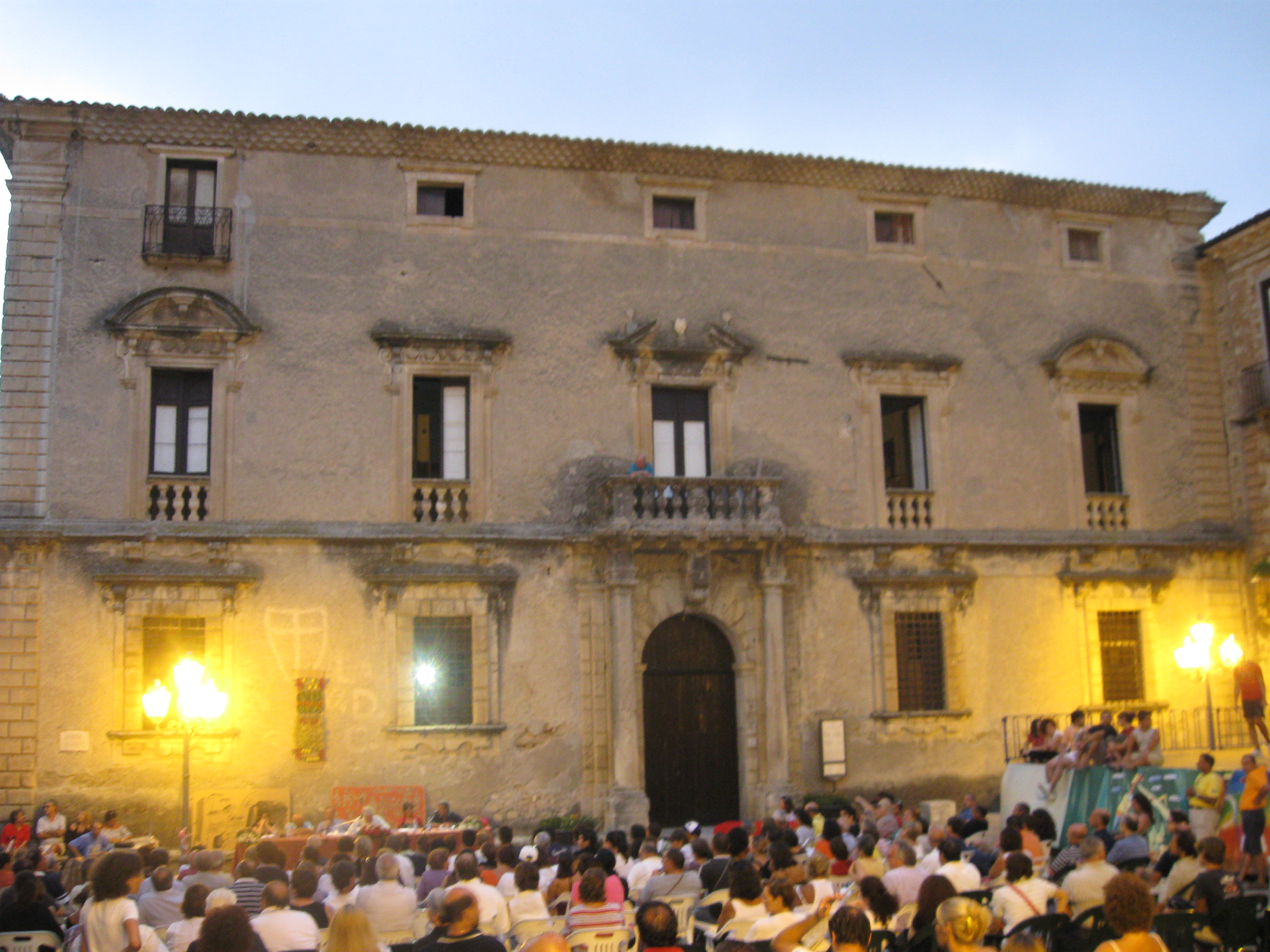 Palazzo Cybo-Malaspina ad Aiello Calabro (Cosenza)